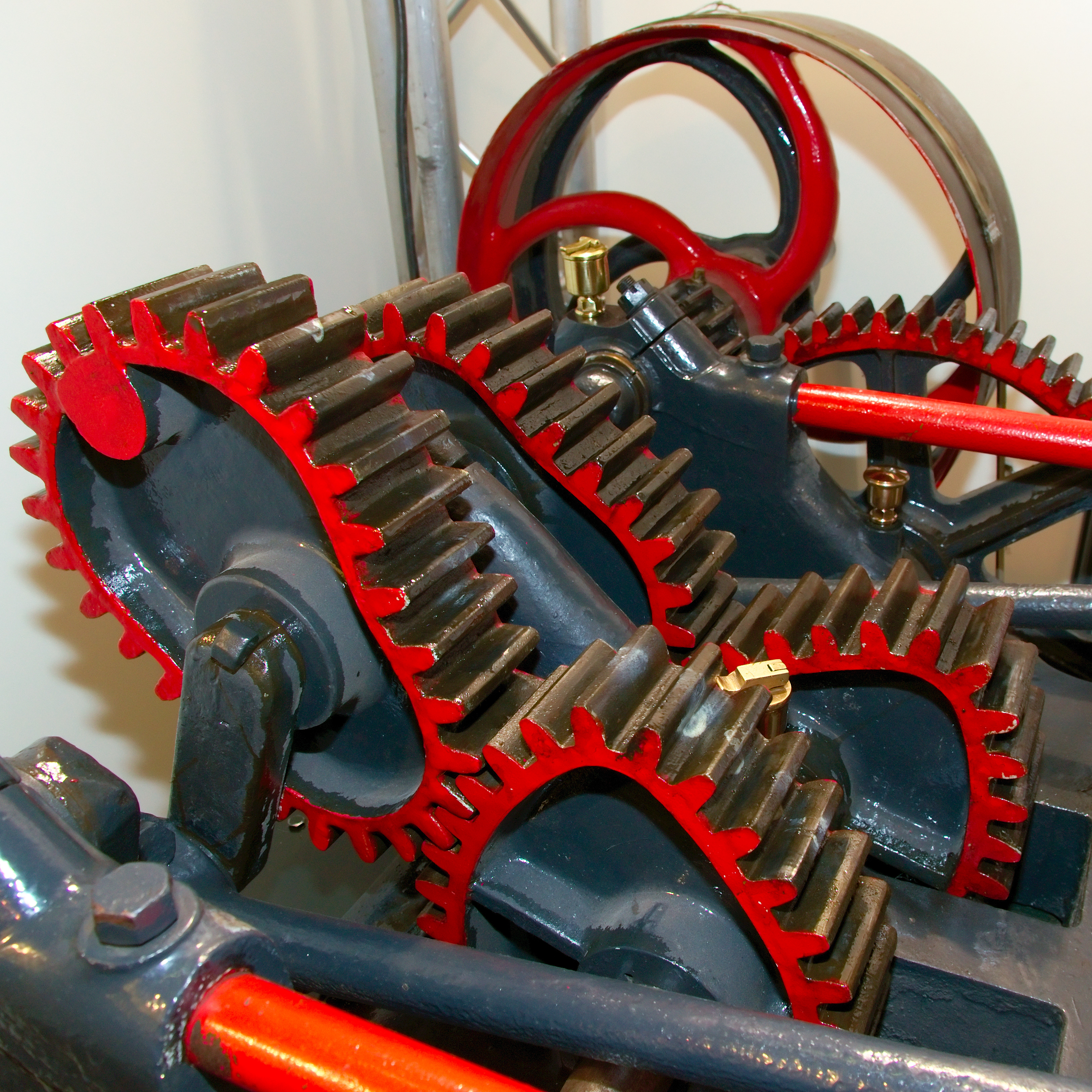 Pompe Girodias présentée à la Foire internationale de Rouen 2012 par le Centre d’Histoire Sociale, Expotec.